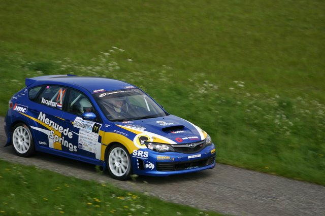 Subaru Impreza WRX STI 2008 Rally Car